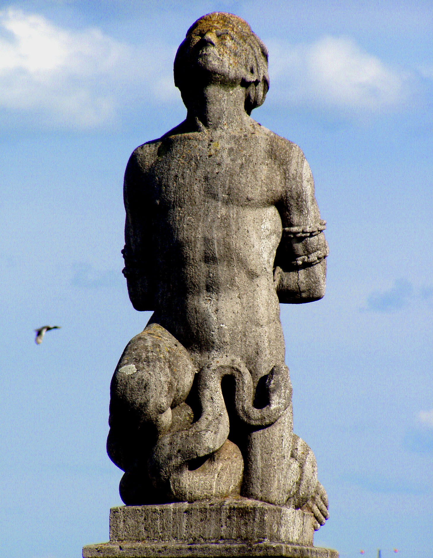 Richard Rother: Gedenkfigur für die Gefallenen des 1.Weltkriegs